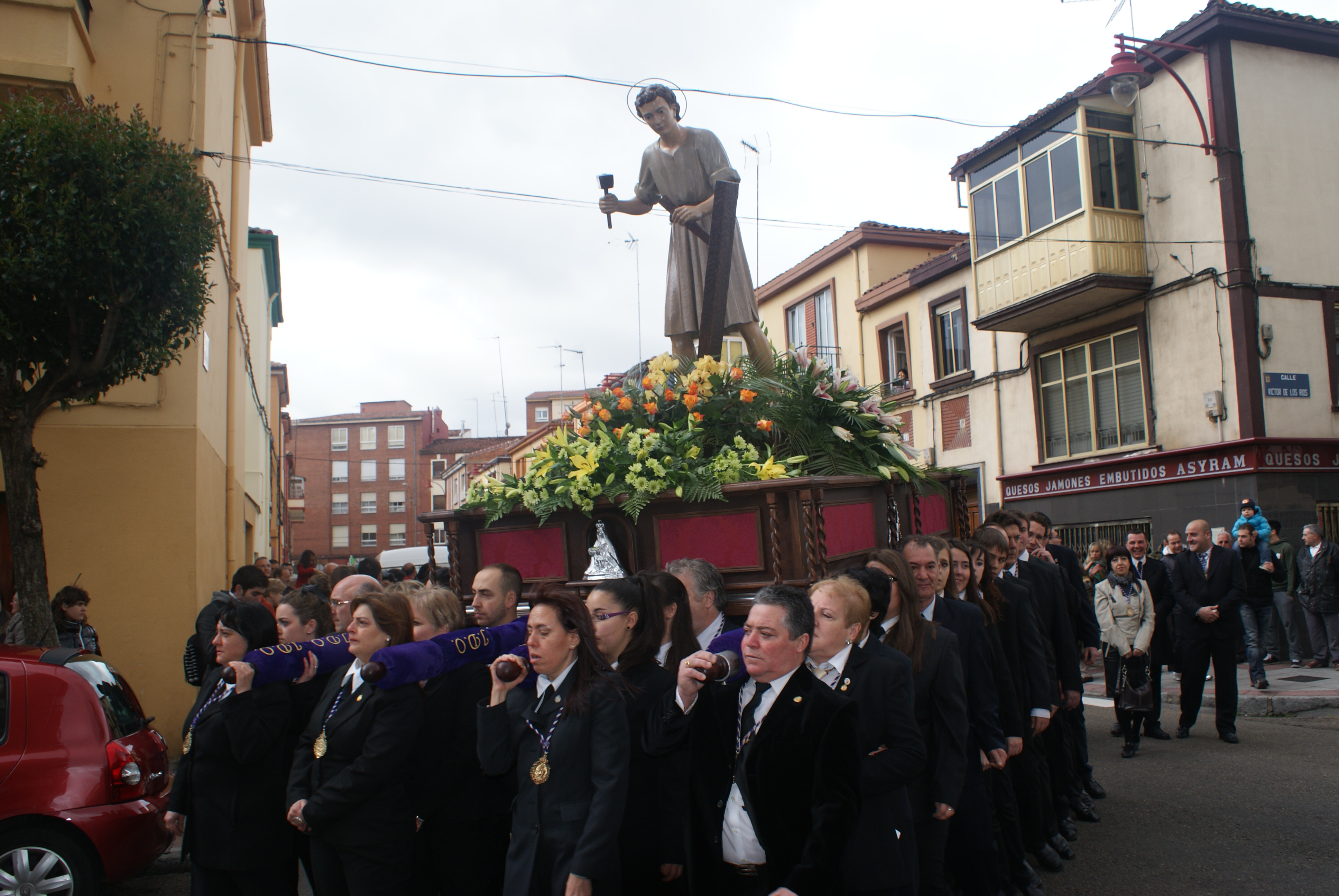 el paso de Jesús Divino Obrero , popularmente conocido como "El Jesusín". Imagen Titular de la Real Hermandad de Jesús Divino Obrero. Autor: Victor De los Rios (1955)